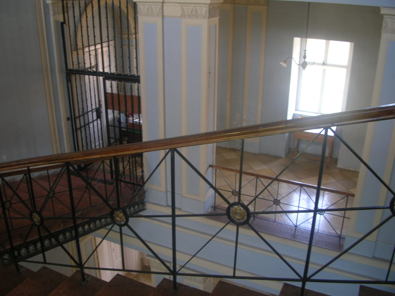 A zirci apátság múzeuma belülről